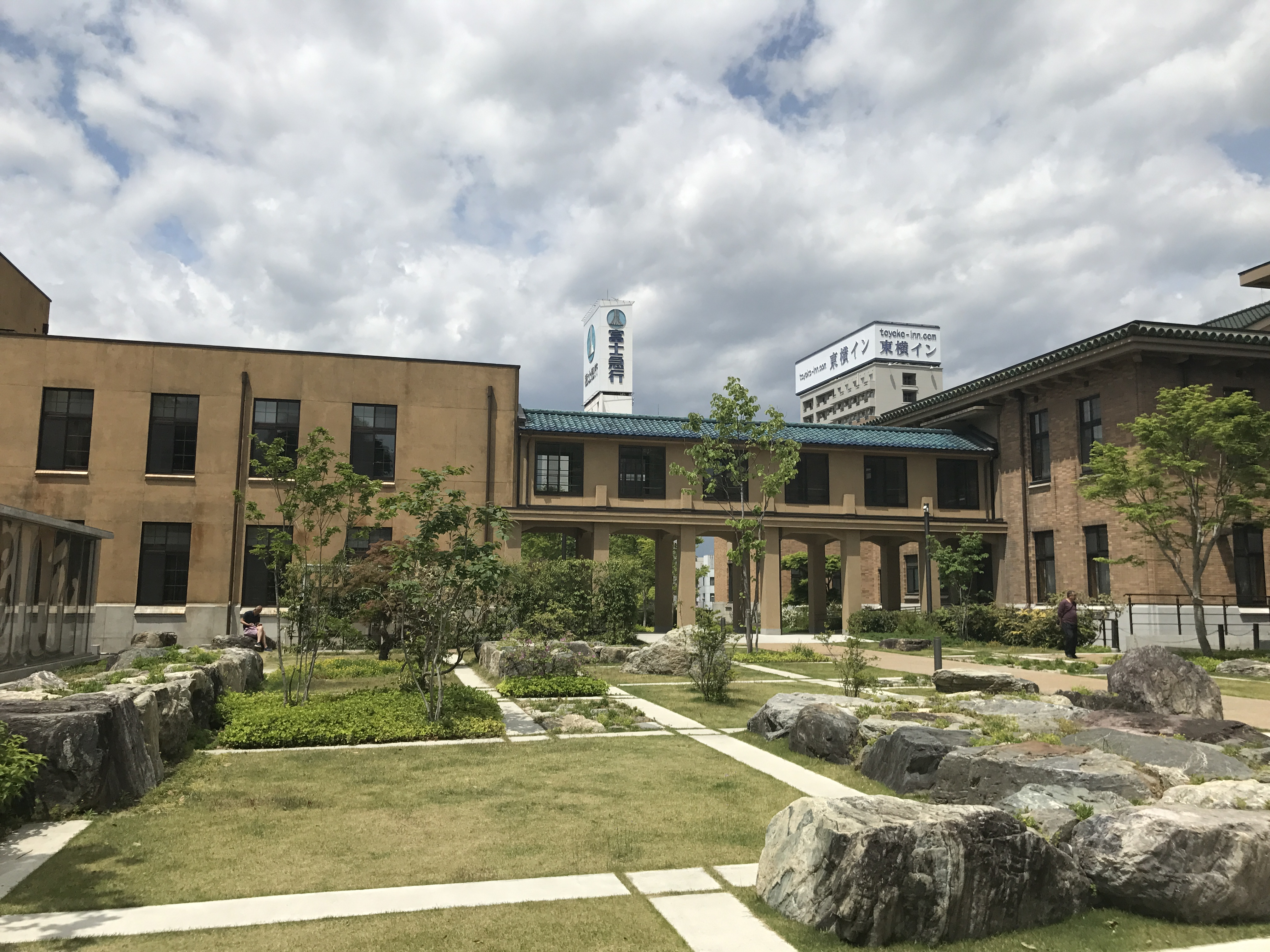 2017年5月6日撮影